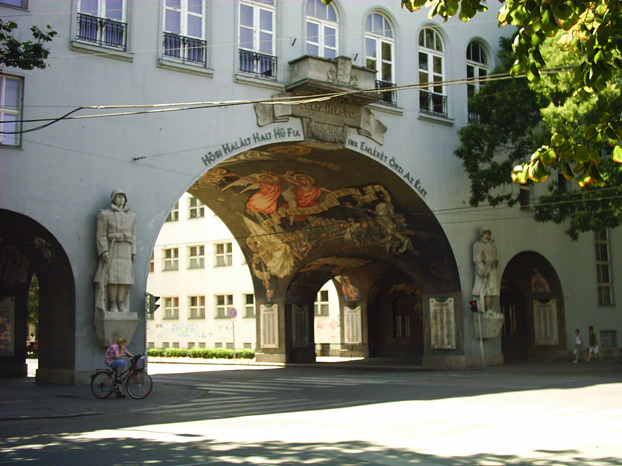 Szeged, Hősök kapuja, neoklasszicizmus. A freskó Aba-Novák Vilmos, az építészeti tervezés Pogány Móric, a szobrok Lőte Éva alkotásai